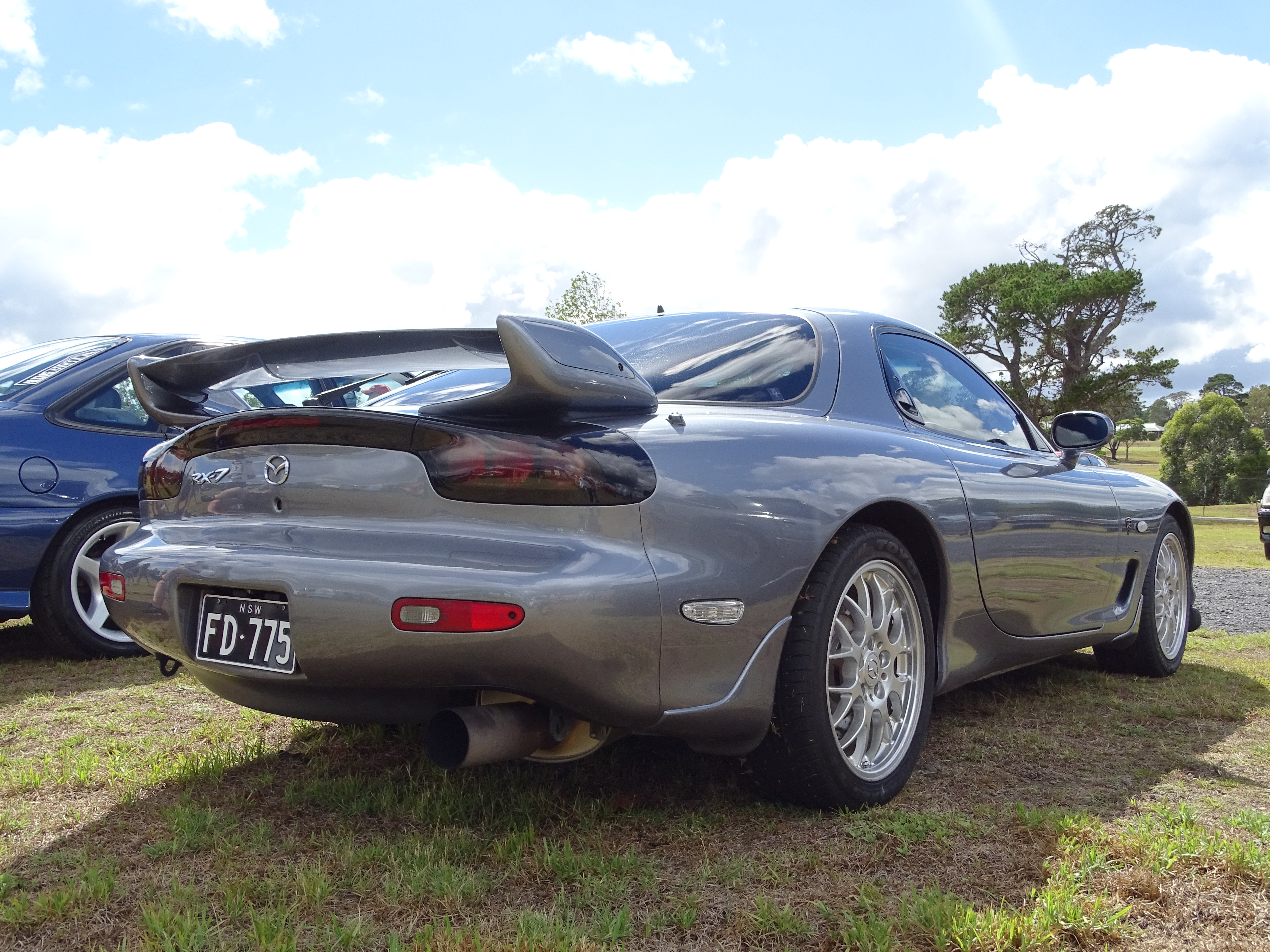 Mazda RX7 Spirit R